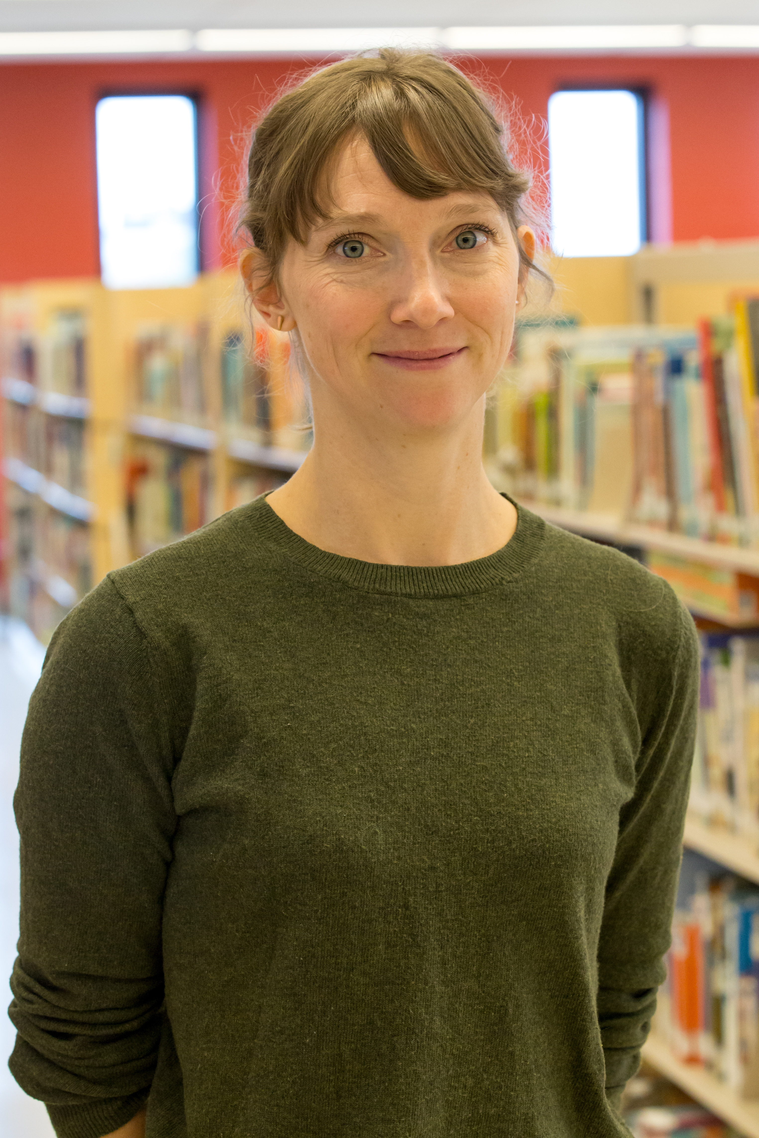 Portrait de l'autrice et illustratrice québécoise Marianne Dubuc. Photo prise à la bibliothèque Saint-Michel lors de la remise du Prix du livre jeunesse des Bibliothèques de Montréal.